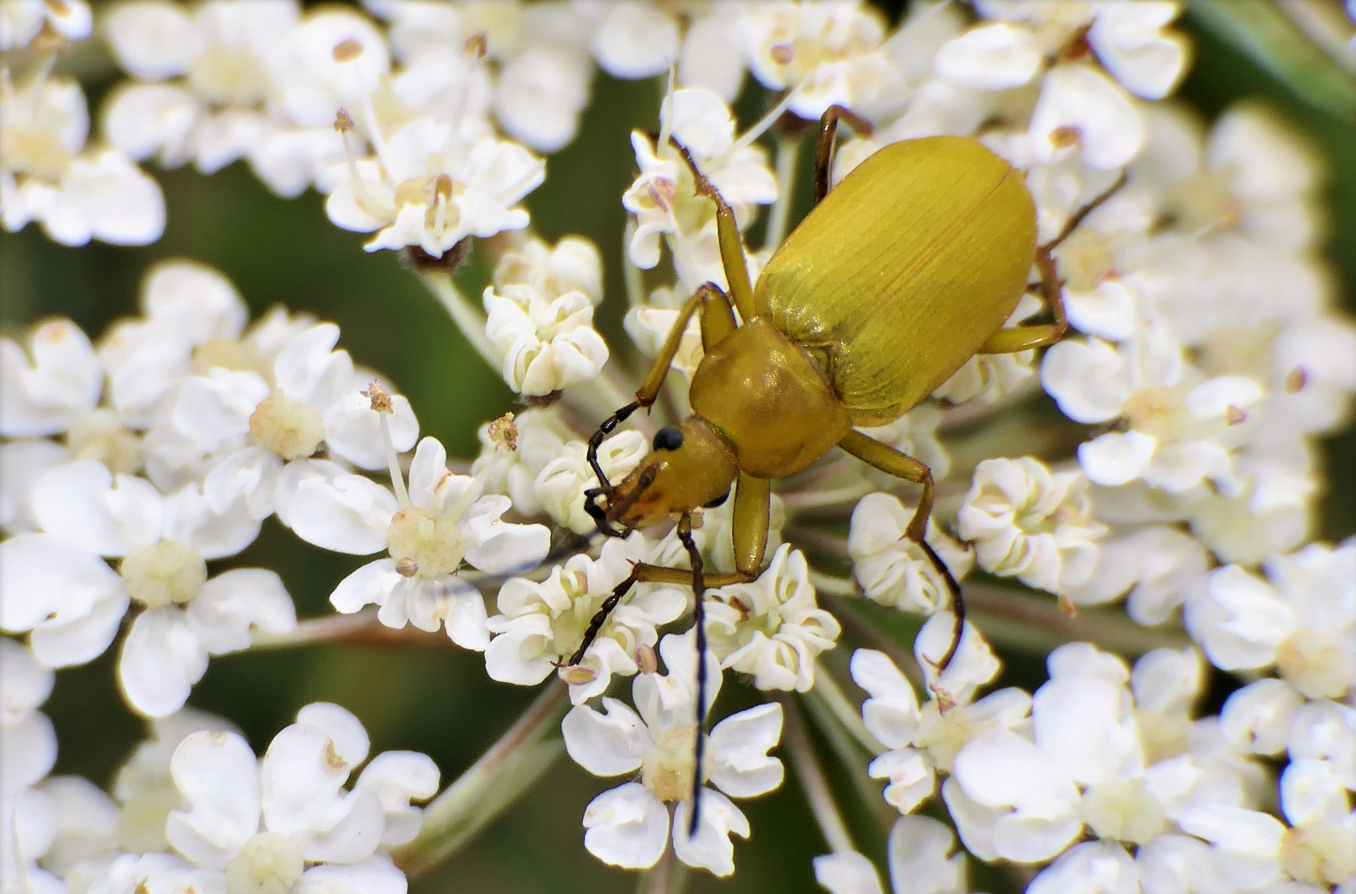 Schwefelkäfer -Cteniopus flavus / sulphureus (L)